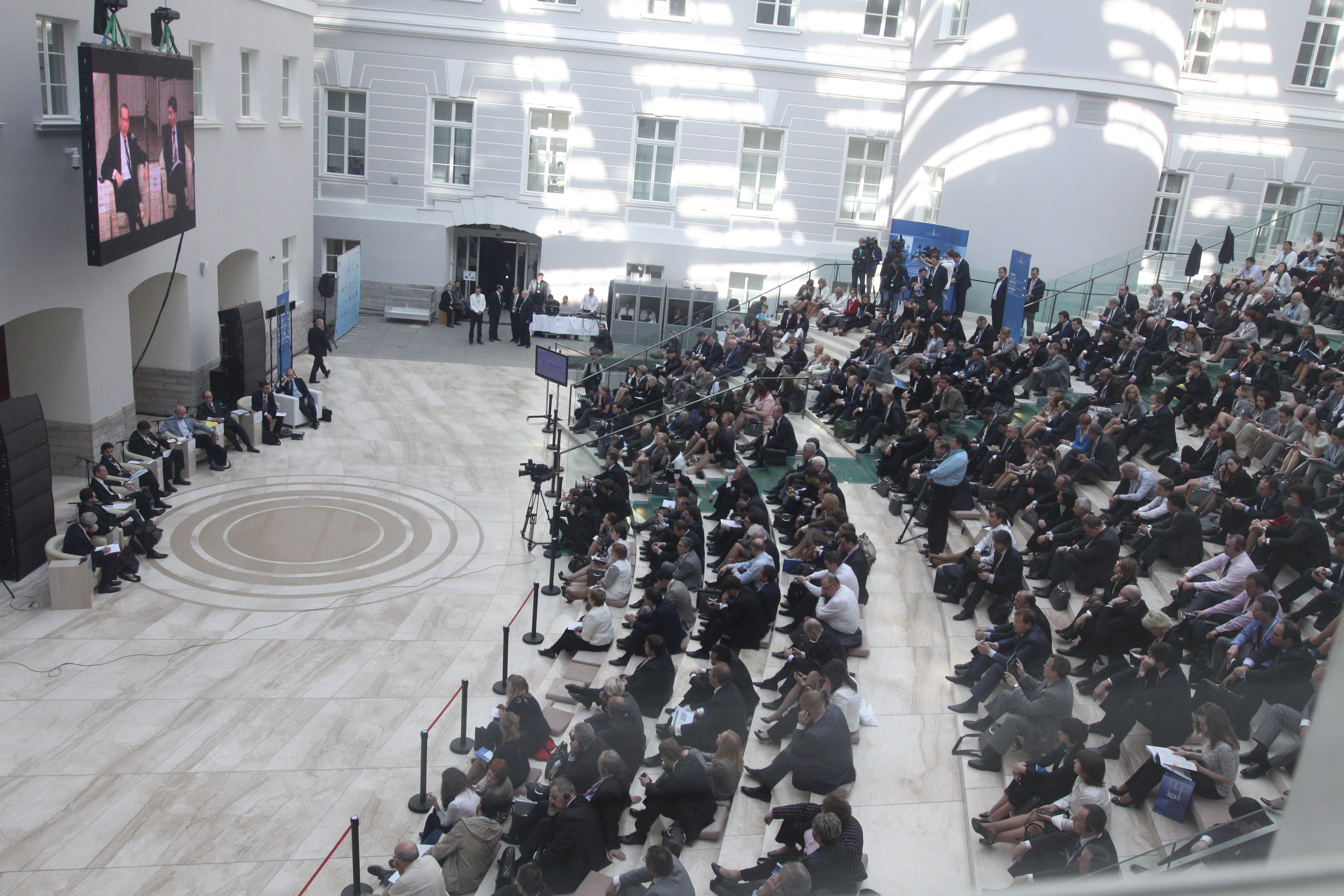 otkrytoe pravitelstvo, spilf